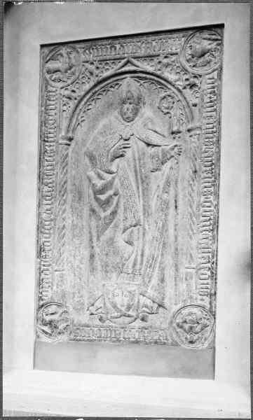 Gravsten, medeltida gravsten över biskop Konrad Rogge, död 1501. Kategori: (09) GravarGravsten, medeltida gravsten över biskop Konrad Rogge, död 1501.